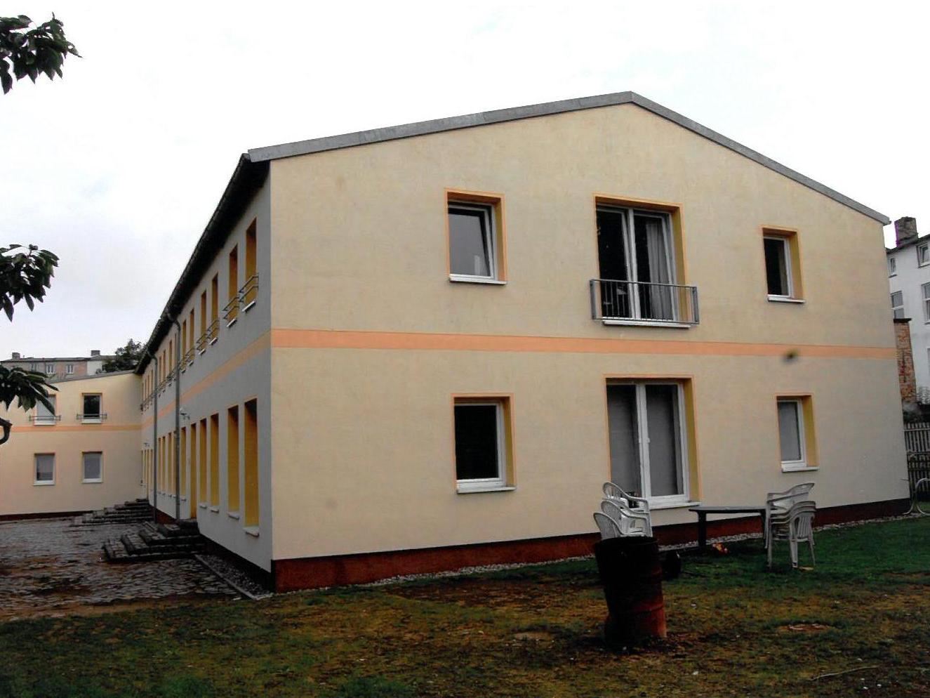 Hofgebäude der Friedrichstraße 28 in der Kröpeliner-Tor-Vorstadt, Rostock